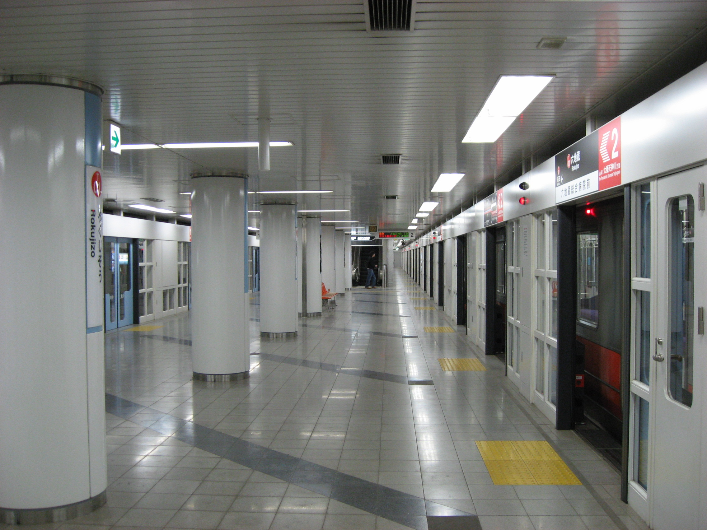 六地蔵駅プラットホーム